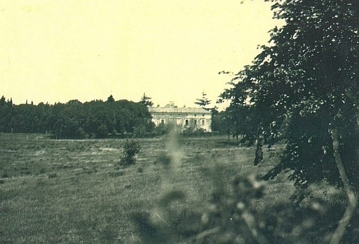 Foto del 1890 circa. La Villa Massimo con il retro del Casino nobile sullo sfondo.